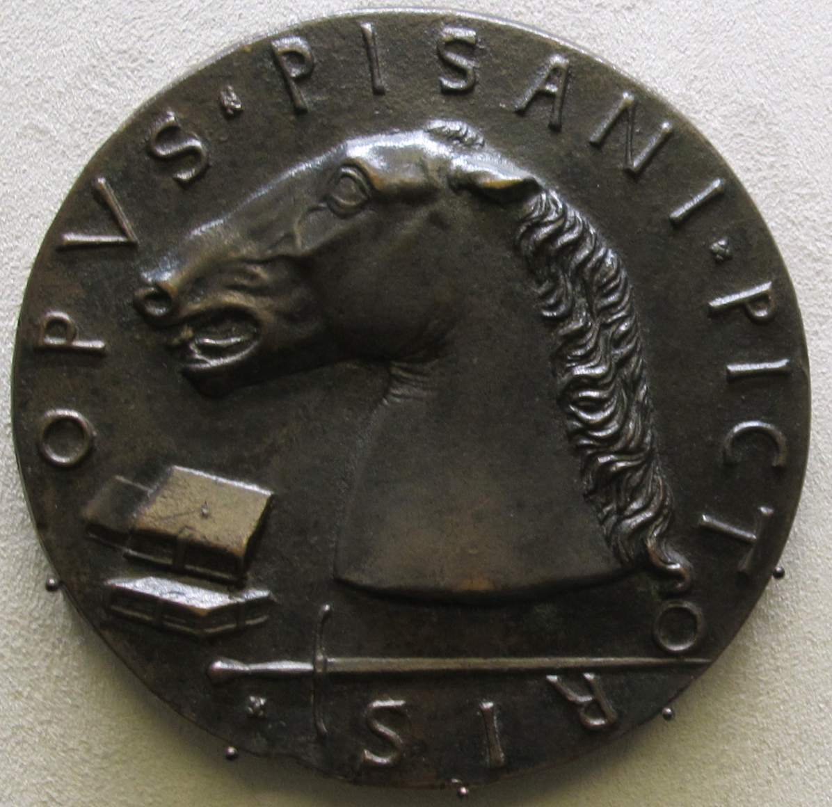 Pisanello, medaglia di francesco sforza, 1441, recto